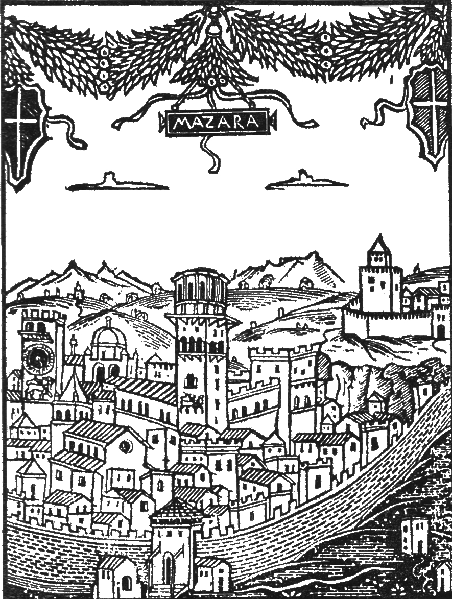 Gian Giacomo Adria (Mazara del Vallo, late 15th century – Palermo, 1560), De Civitate Mazariae. Public Domain, author died since more 100 years.